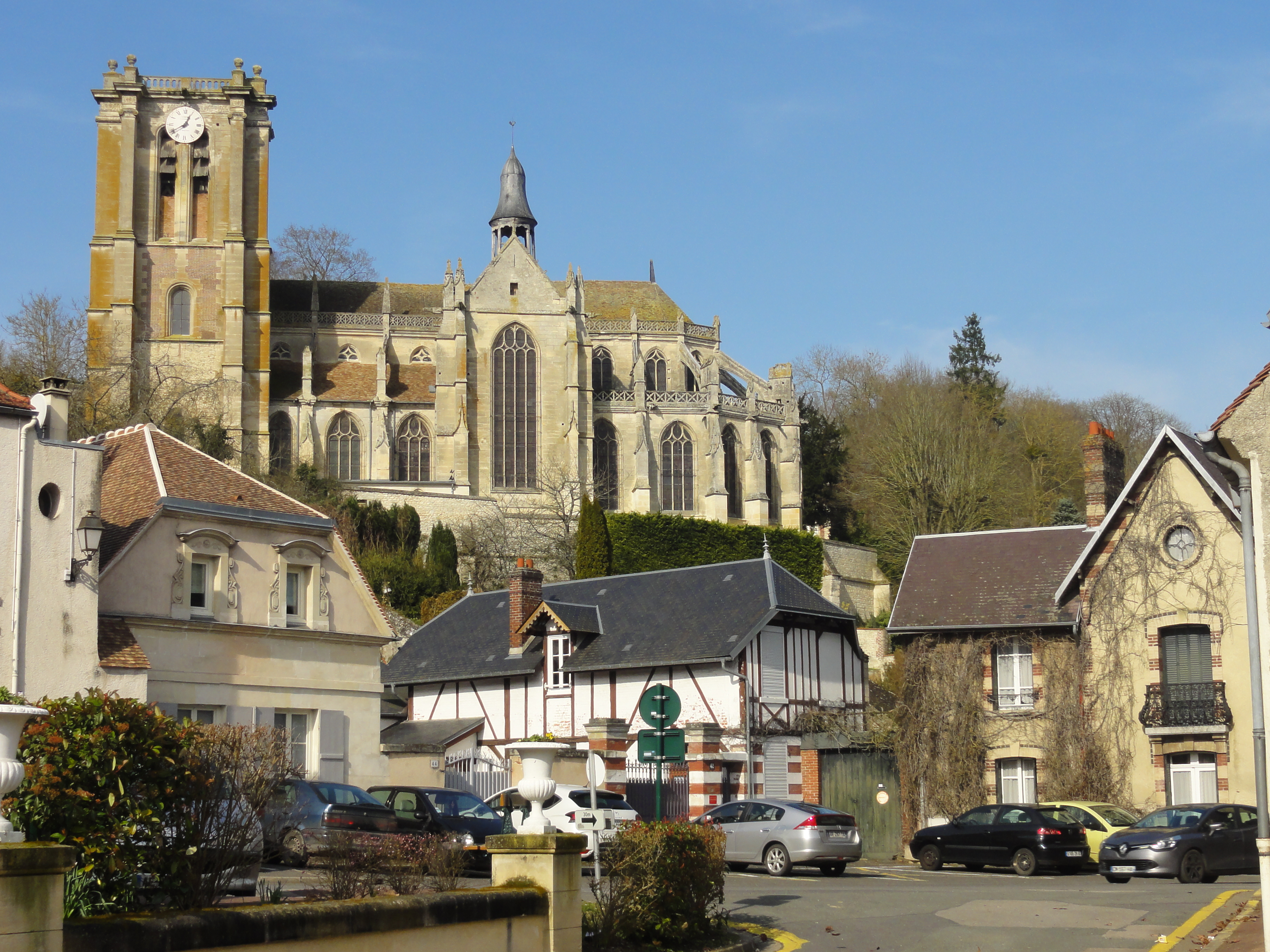 Église Saint-Jean-Baptiste de Chaumont-en-Vexin - voir titre.